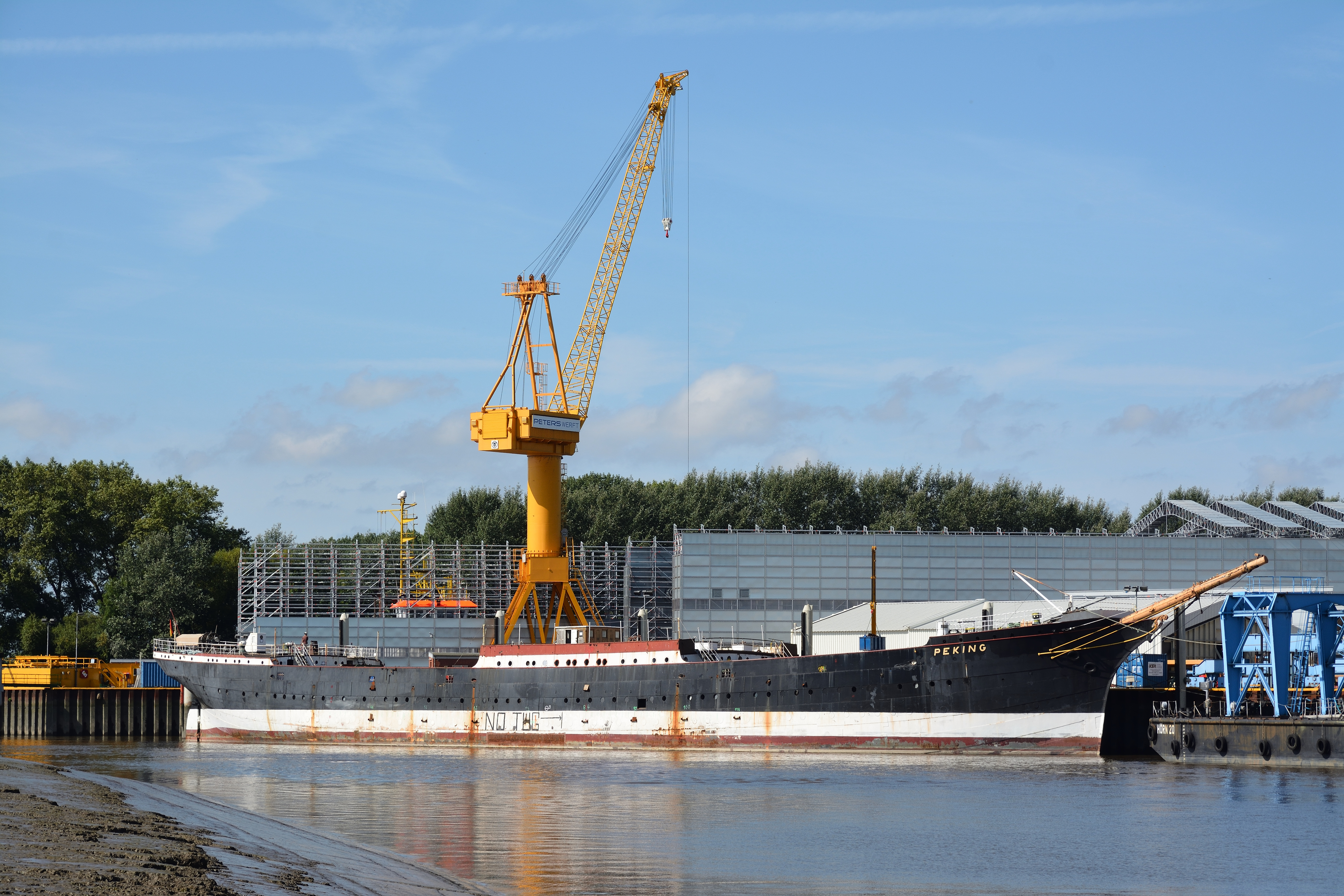 Die Viermastbark Peking vor der Peters Werft in Wewelsfleth im August 2017. Alle Masten sind demontiert.